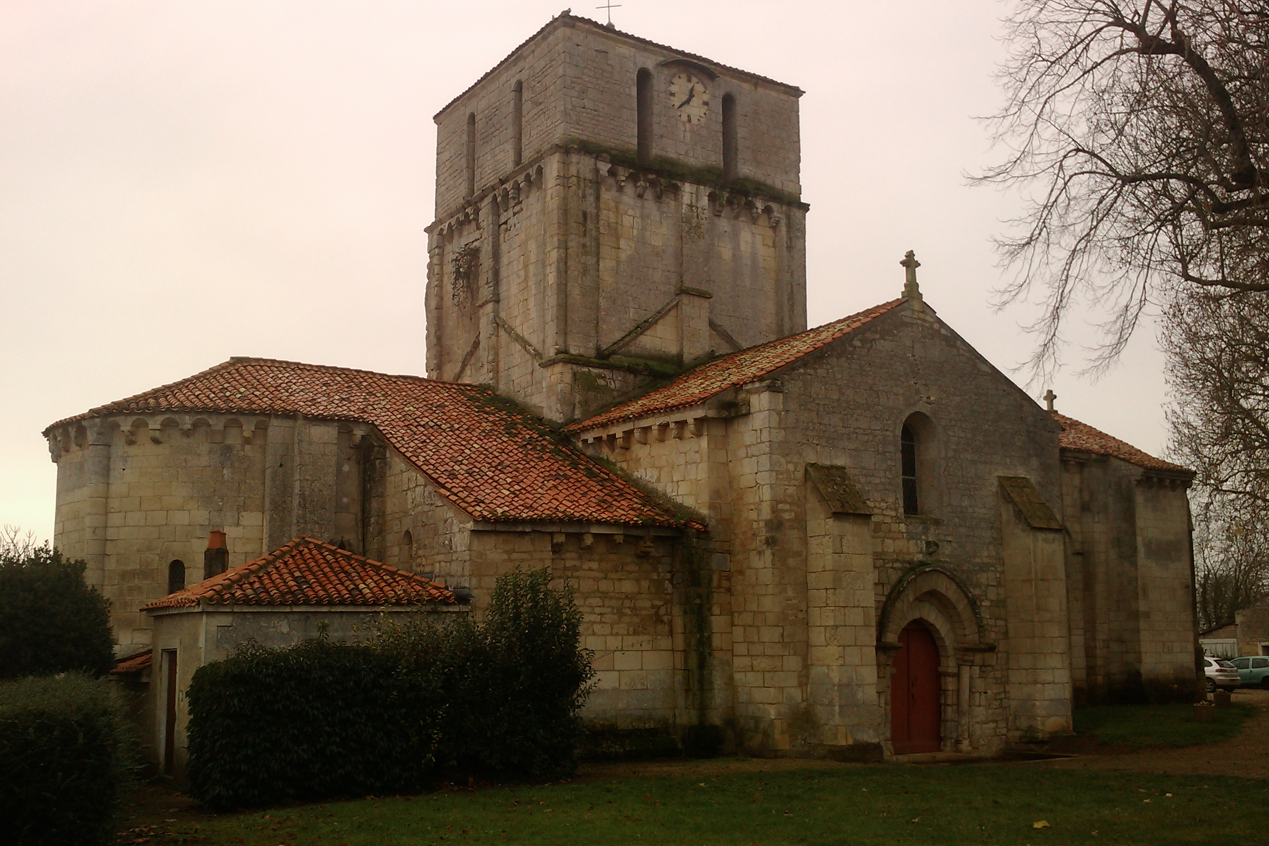 église romane du XIIe siècle Notre-Dame d'Oulmes